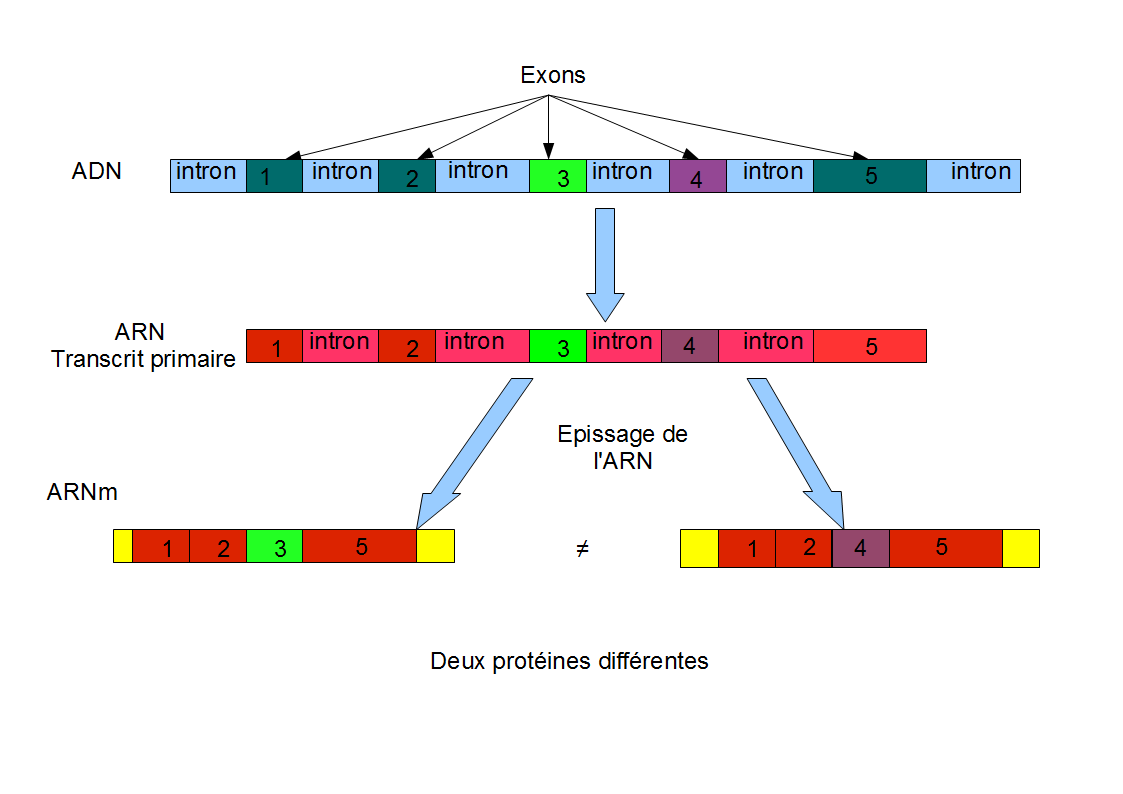 shéma de la transcription et de l'épissage d'un brins d'ARN